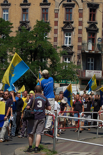 II Marsz Autonomii, Plac Miarki w Katowicach